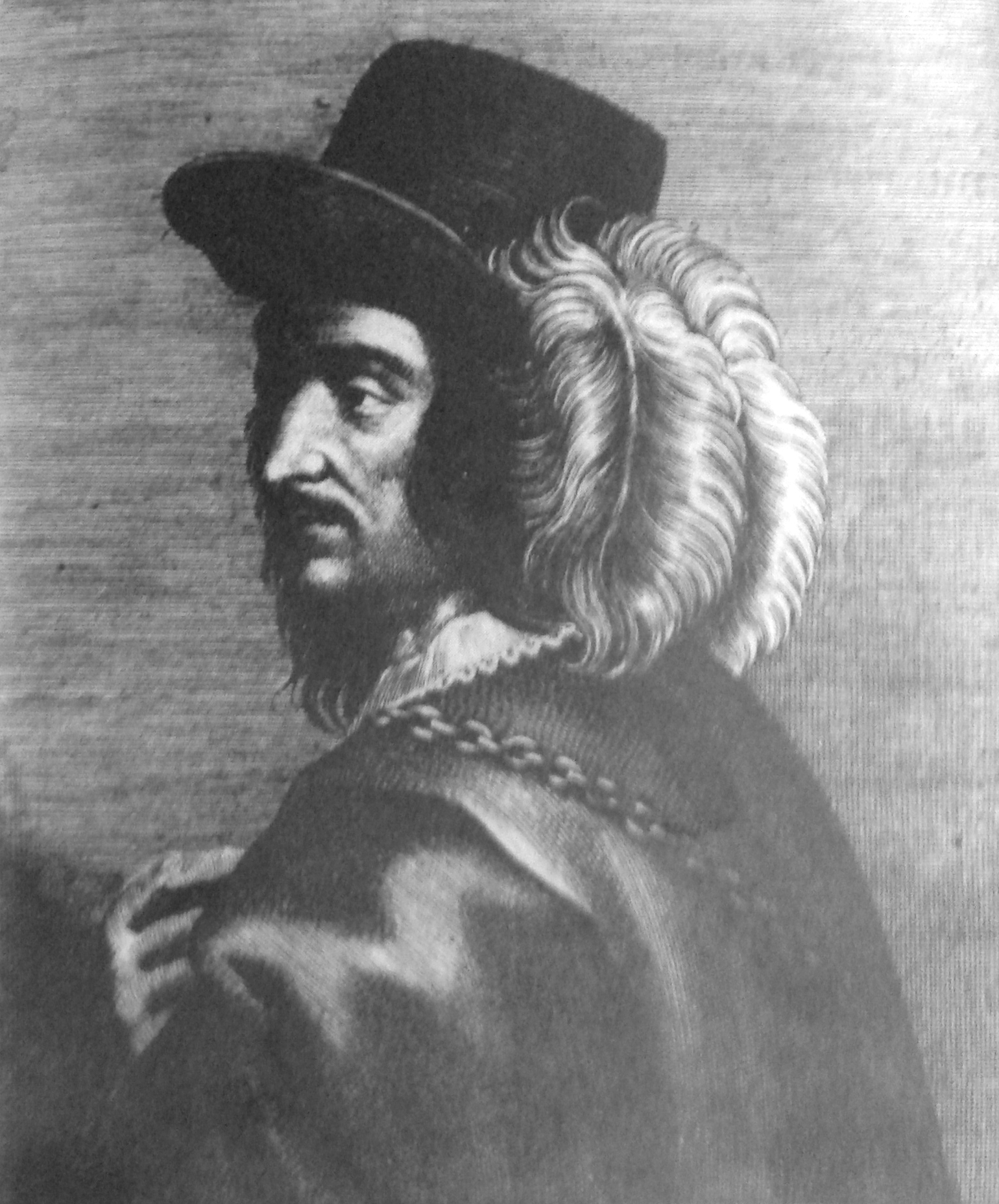 Gravado aparecido na primeira edición da novela Estebanillo González (Antuerpen, 1646)